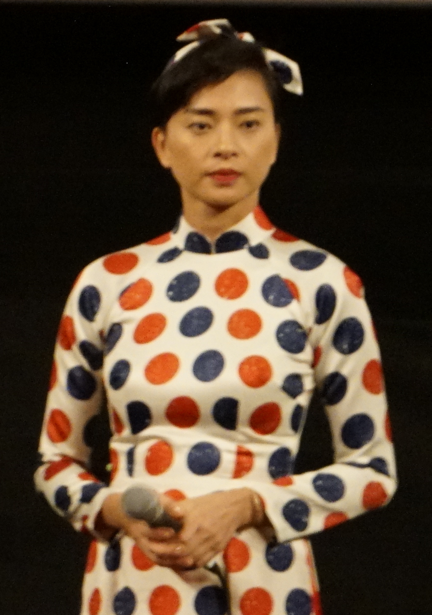 2017, 22nd of BIFF, 3rd day, Vietnam Movie, 'The Tailor', World Premier